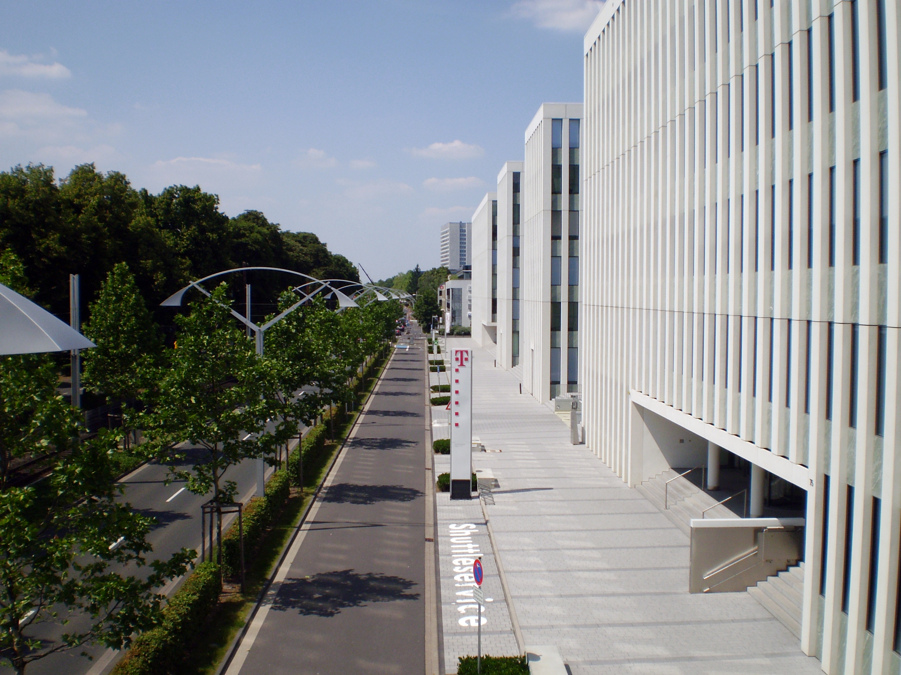 Office Port Bonn an der Friedrich-Ebert-Allee, hinten rechts das Tulpenfeld-Hochhaus